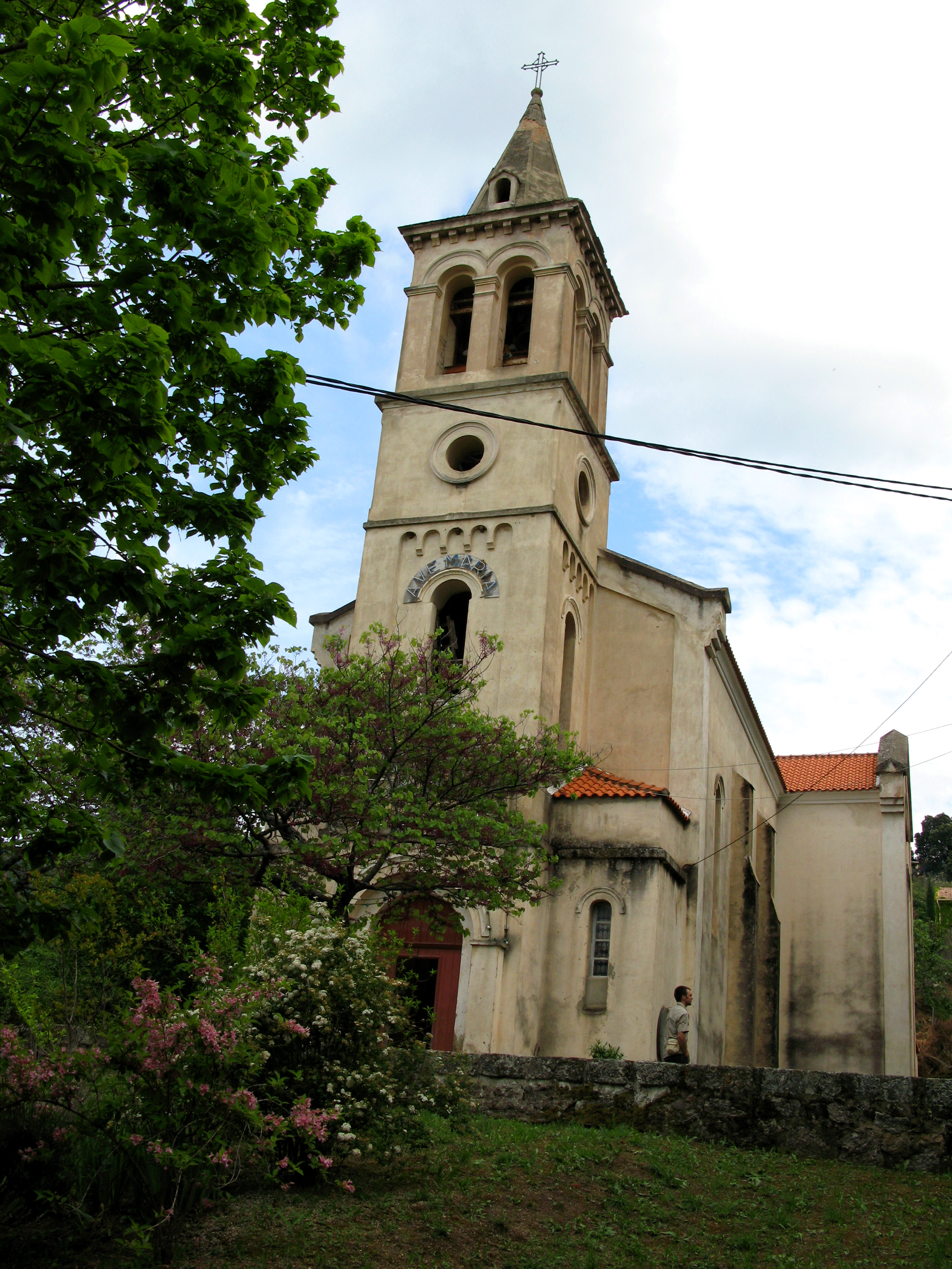 Petreto-Bicchisano (Corse-du-Sud, France) - Eglise. L'édifice domine la rue. On remarque l'inscription semi-circulaire (en grandes lettres) "Ave Maria" au-dessus de l'entrée (au deuxième niveau de la face de la tour du clocher).